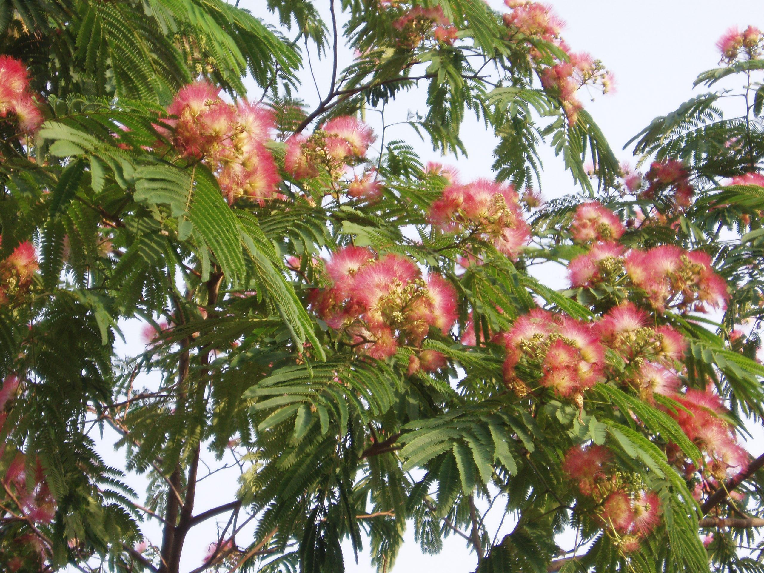 Albizzia julibrissin trees